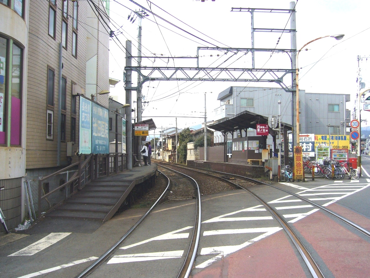 京福電気鉄道嵐山本線蚕ノ社駅。2008年1月16日に京都市営地下鉄東西線の太秦天神川駅が開業して、同年3月下旬に嵐電天神川駅が開業するまでの間、地下鉄との乗換駅となっている。駅のすぐ太秦天神川駅側から2008年3月6日に投稿者が撮影。